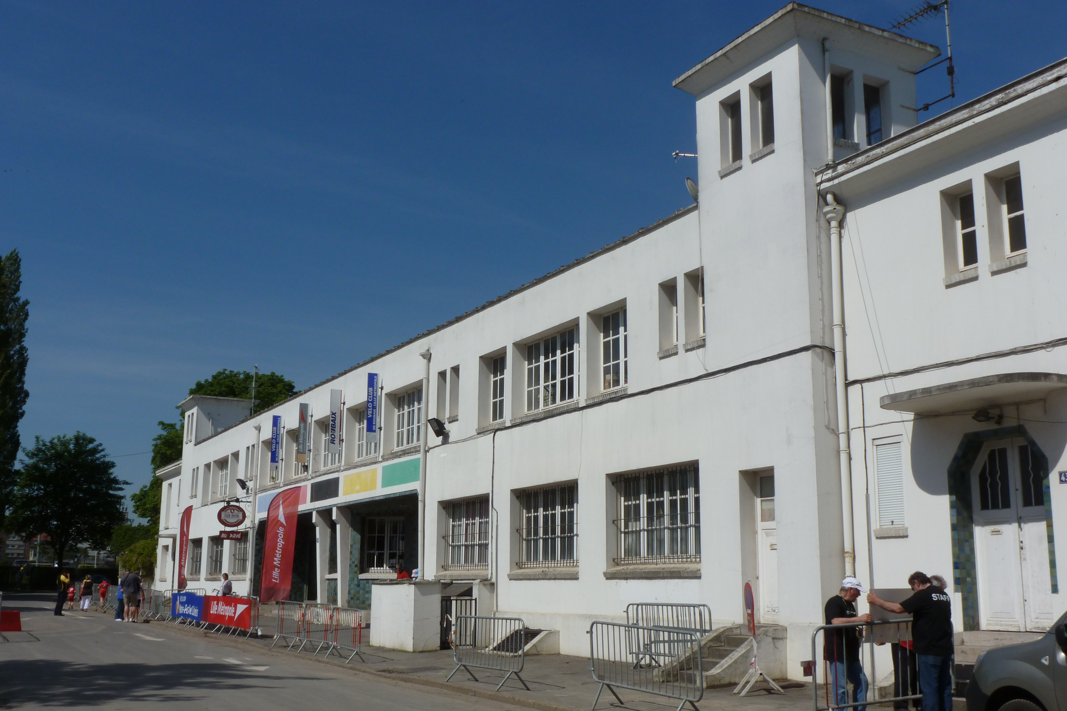 Radrennbahn André Pétrieux in Roubaix, Umkleiden und Café